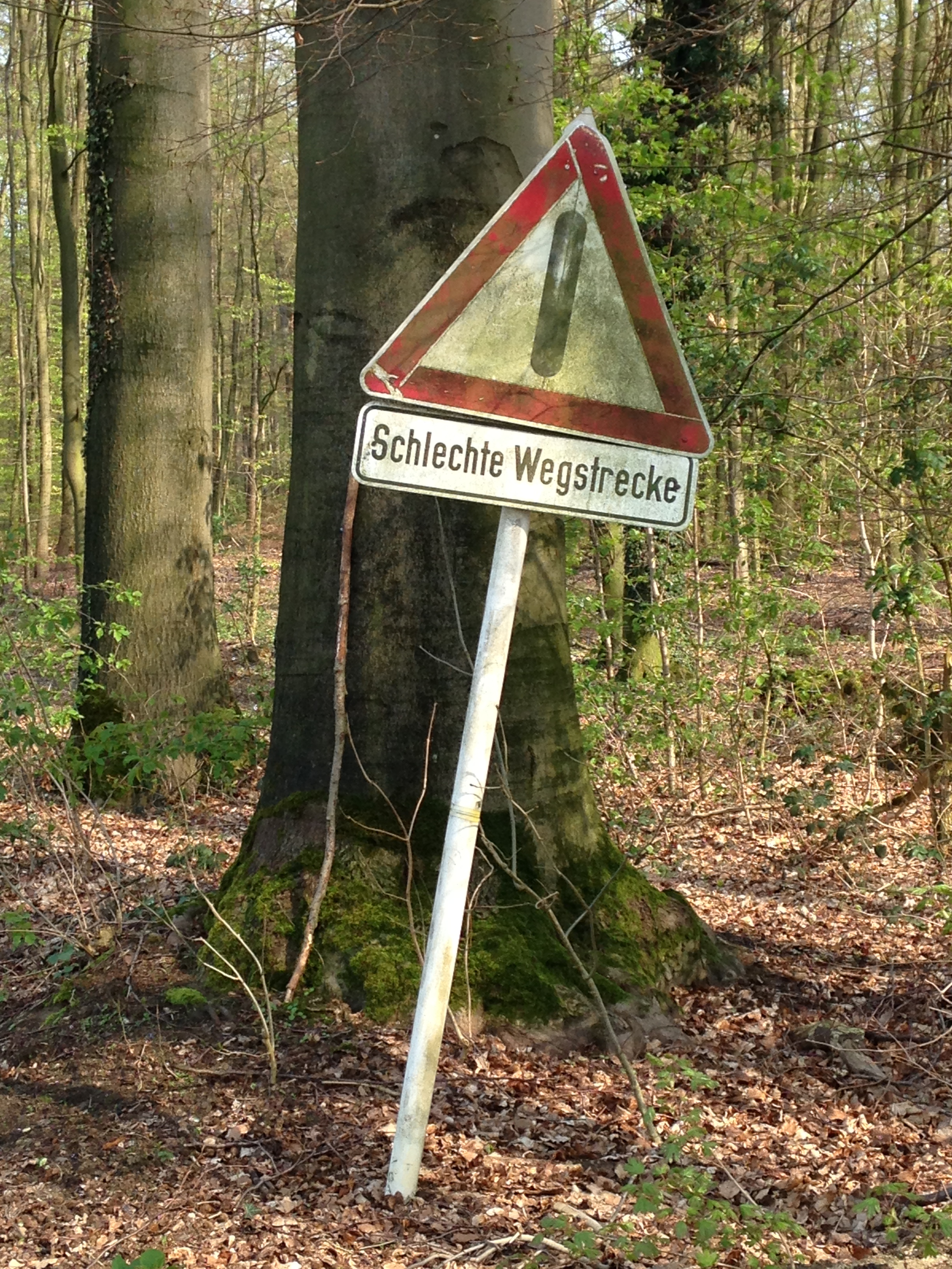 Verkehrszeichen aus der Bildtafel der Verkehrszeichen 1956 - 1971, Stand 2019 - Marl, Nordrhein-Westfalen, Bundesrepublik Deutschland